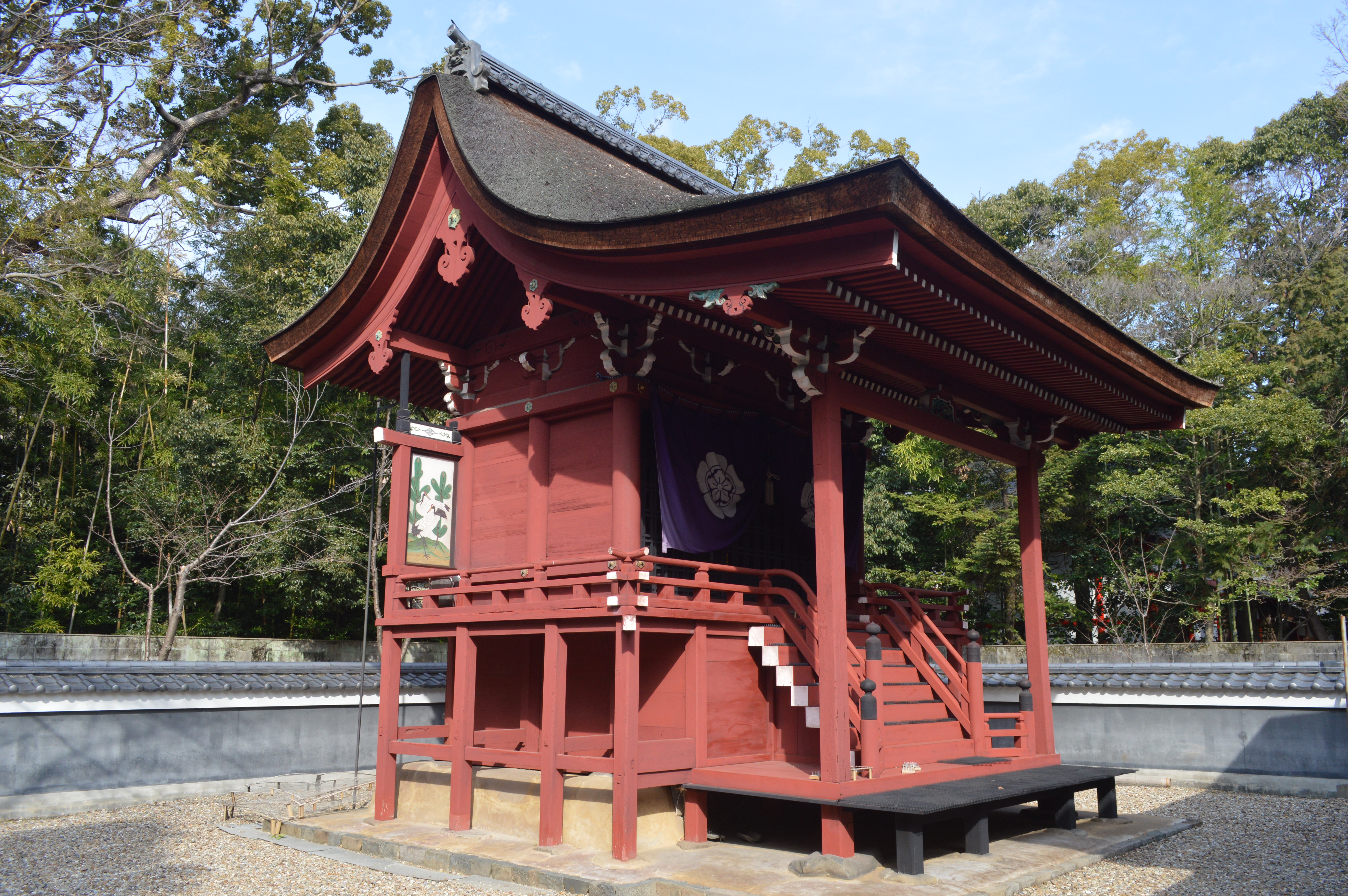 愛知県名古屋市南区にある富部神社の本殿。重要文化財。